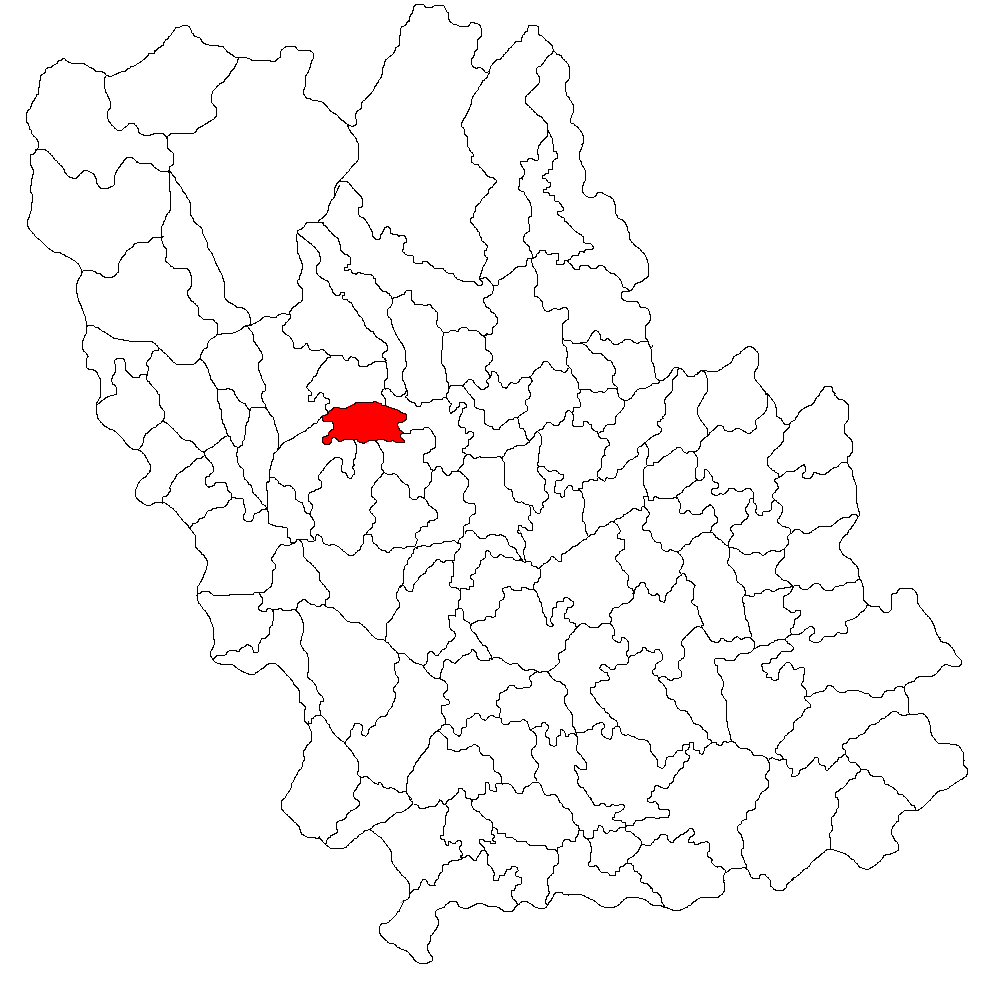 Categorie:Hărţi ale judeţului Prahova